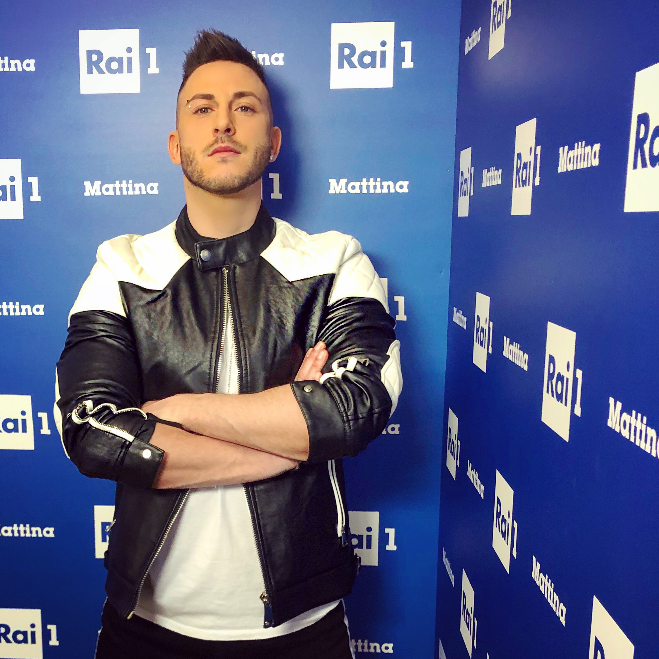 Alex Palmieri in den Rai-Studios